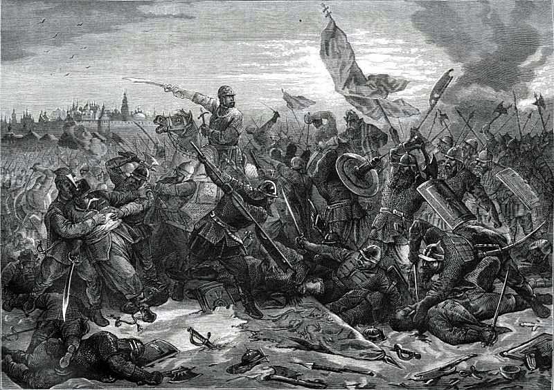 Это гравюра Поца, оригинальный рисунок Коверзнева: «Битва князя Пожарского с гетманом Ходкевичем под Москвой». Находился в собственности журнала Нива до 1917 года